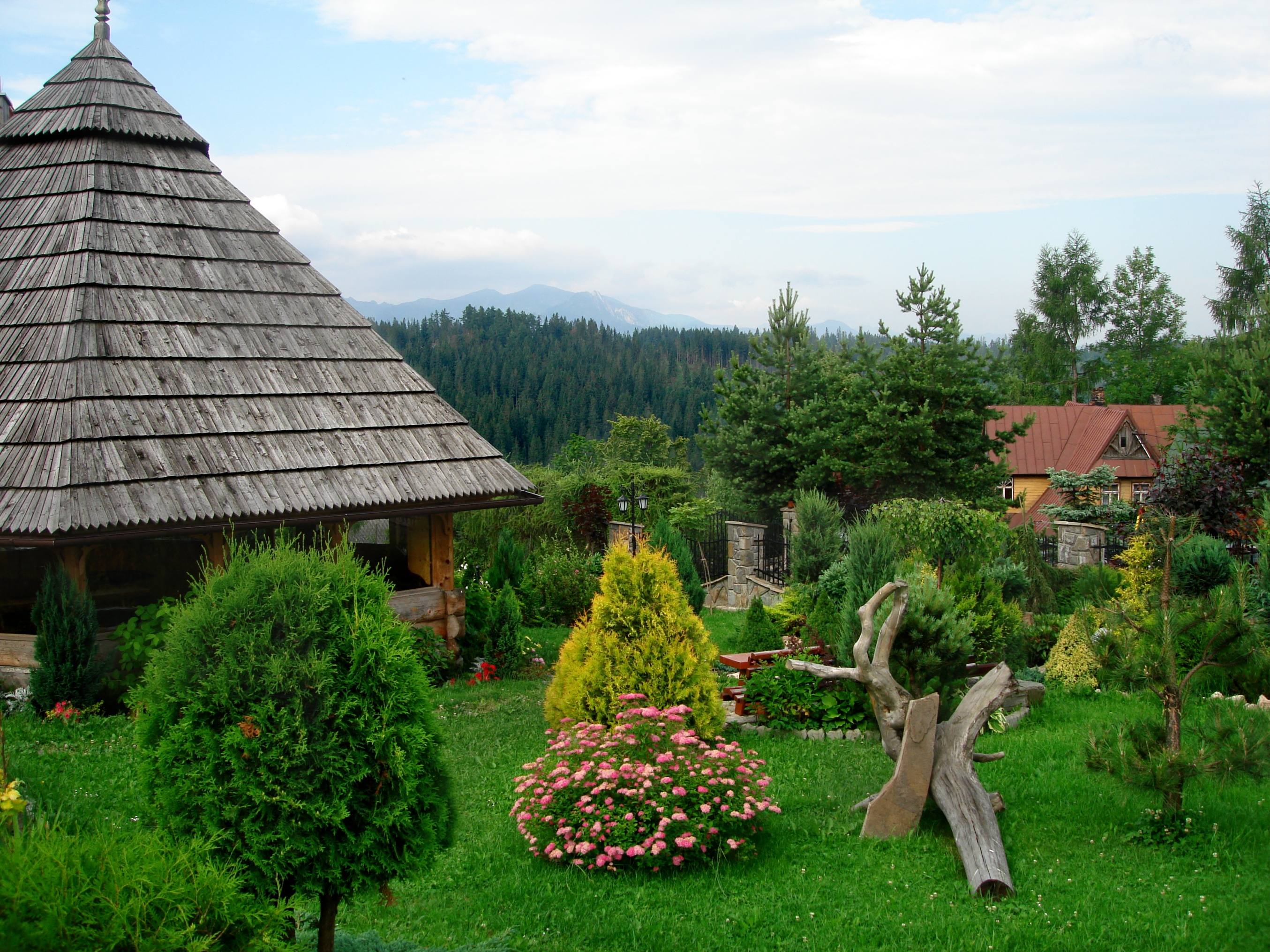 Bukowina Tatrzańska - Wierch Olczański, Poland